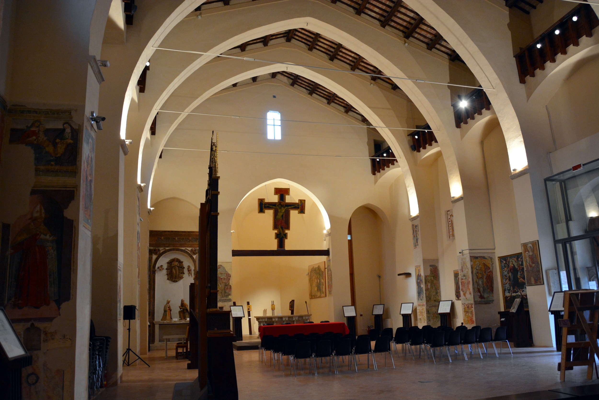 Pinacoteca comunale, Chiesa di San Francesco This is a photo of a monument which is part of cultural heritage of Italy.